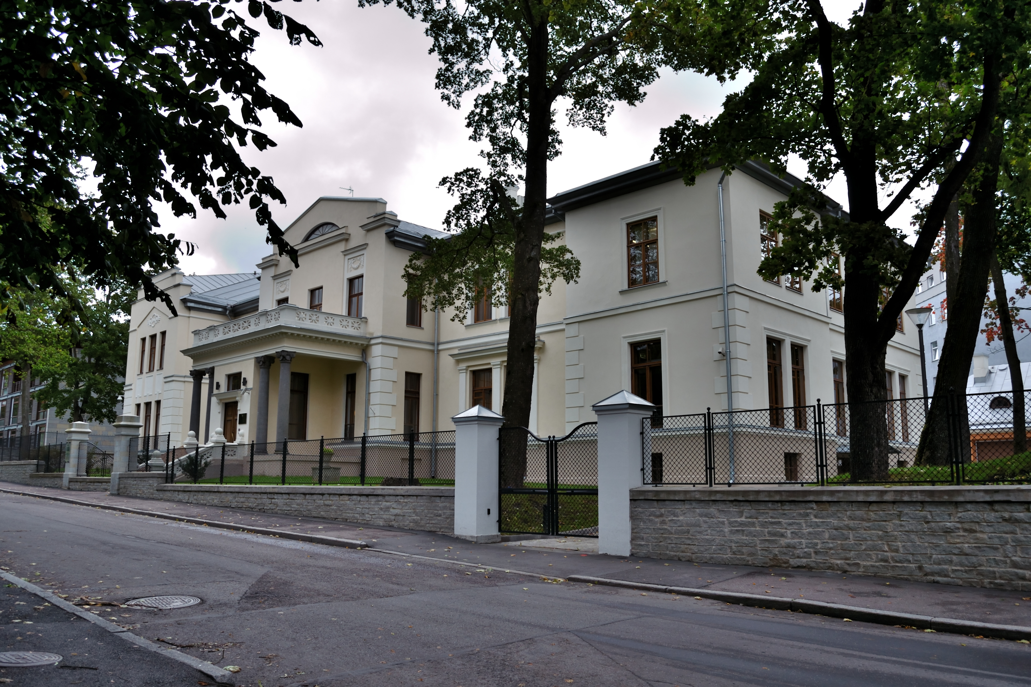 Tallinn, pangahoone Wismari 7, 1869, 1914